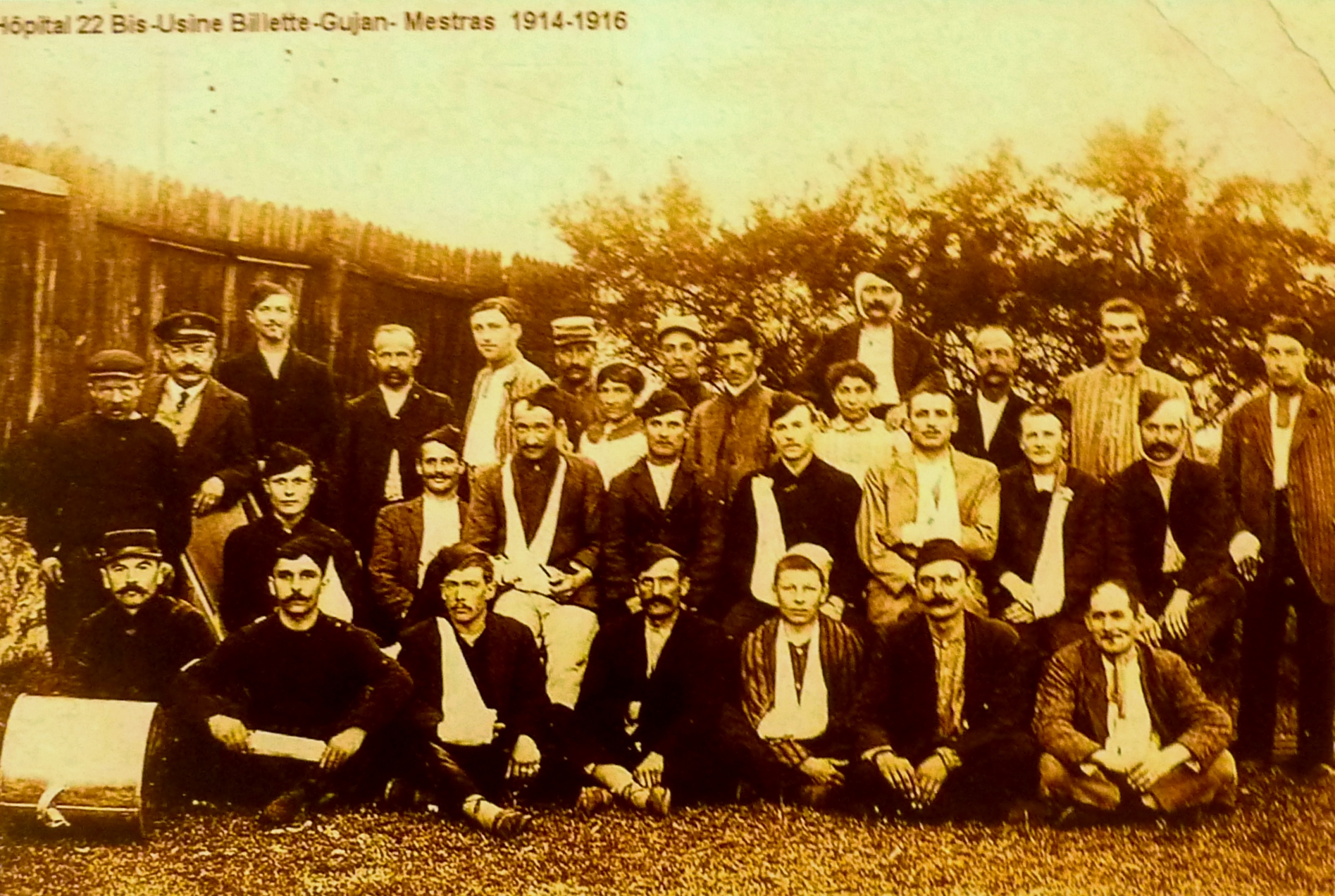 Soldats blessés hospitalisés dans l'hôpital 22 bis entre 1914 et 1916 (usine Gujan-Mestras) à Concarneau